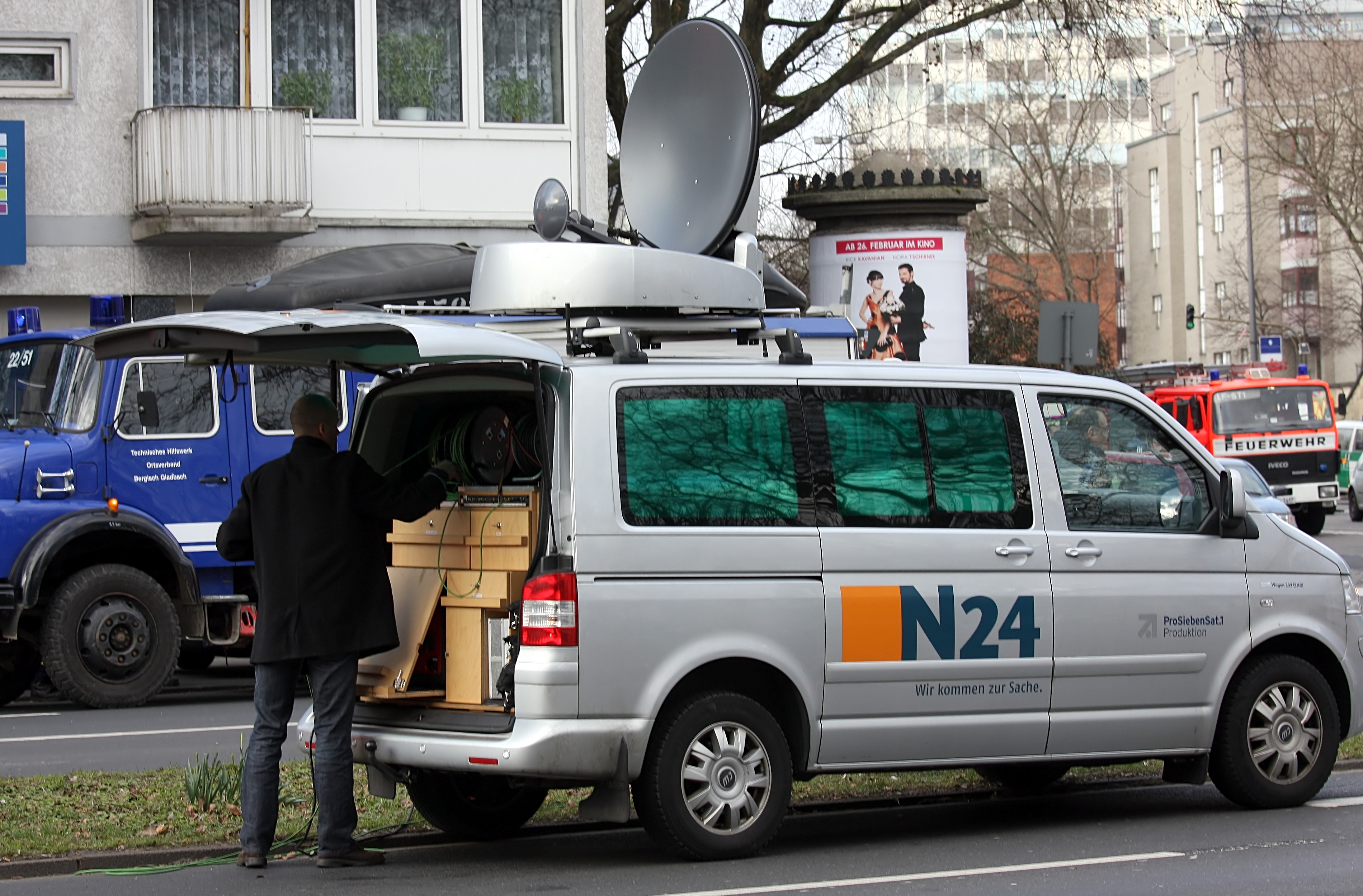 N24-Übertragungswagen (VW T5 Vorfaceliftversion, eventuell Ausstattungslinie Caravelle oder Multivan) in Köln. Reportage vom Einsturz des Historischen Stadtarchivs. Kreuzung Rothgerberbach/Blaubach/Tel-Aviv-Straße (Nord-Süd-Fahrt)